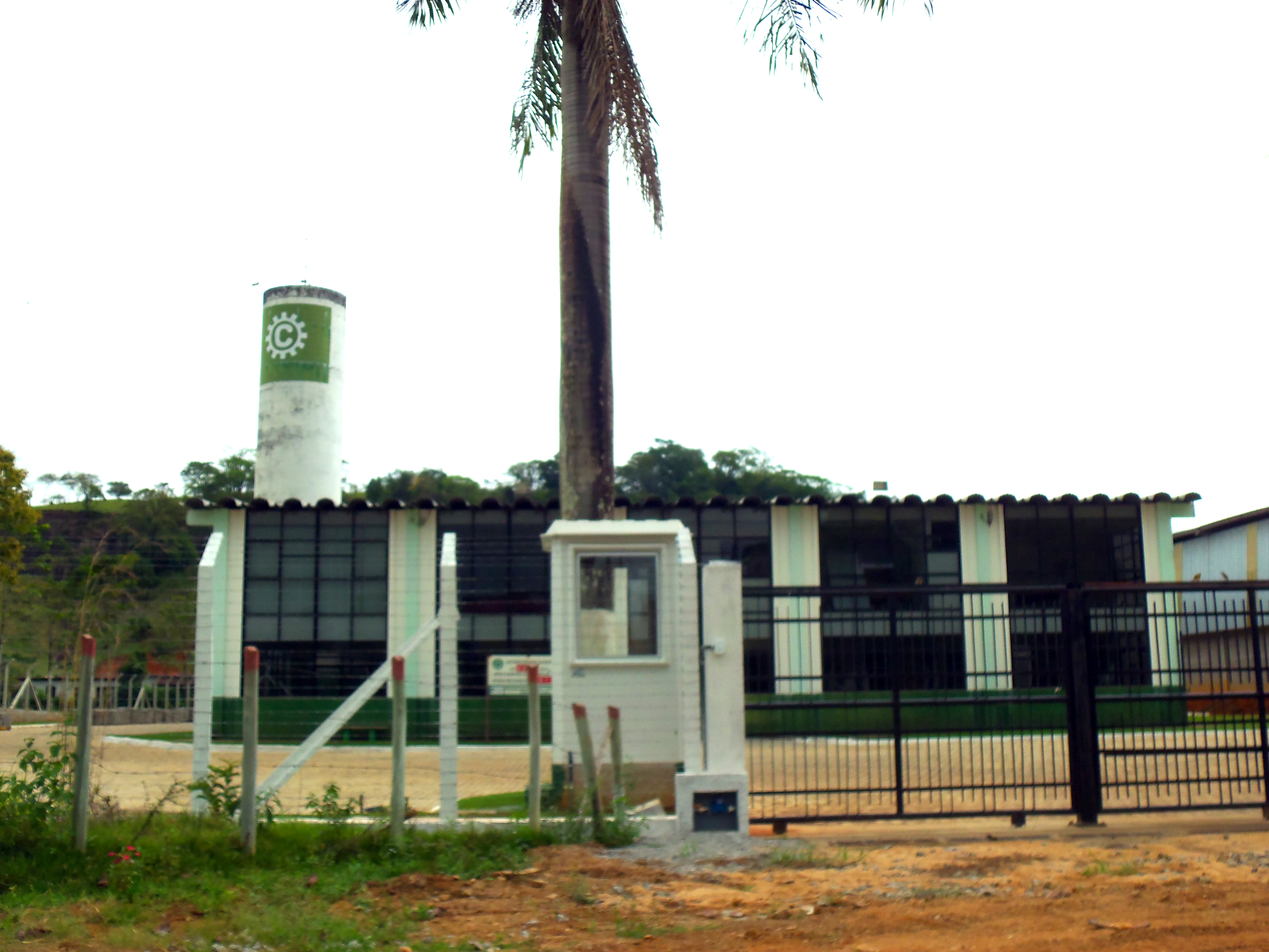 Fábrica de equipamentos para exploração de petróleio Columbia Tecnologia, em Fundão, Espírito Santo